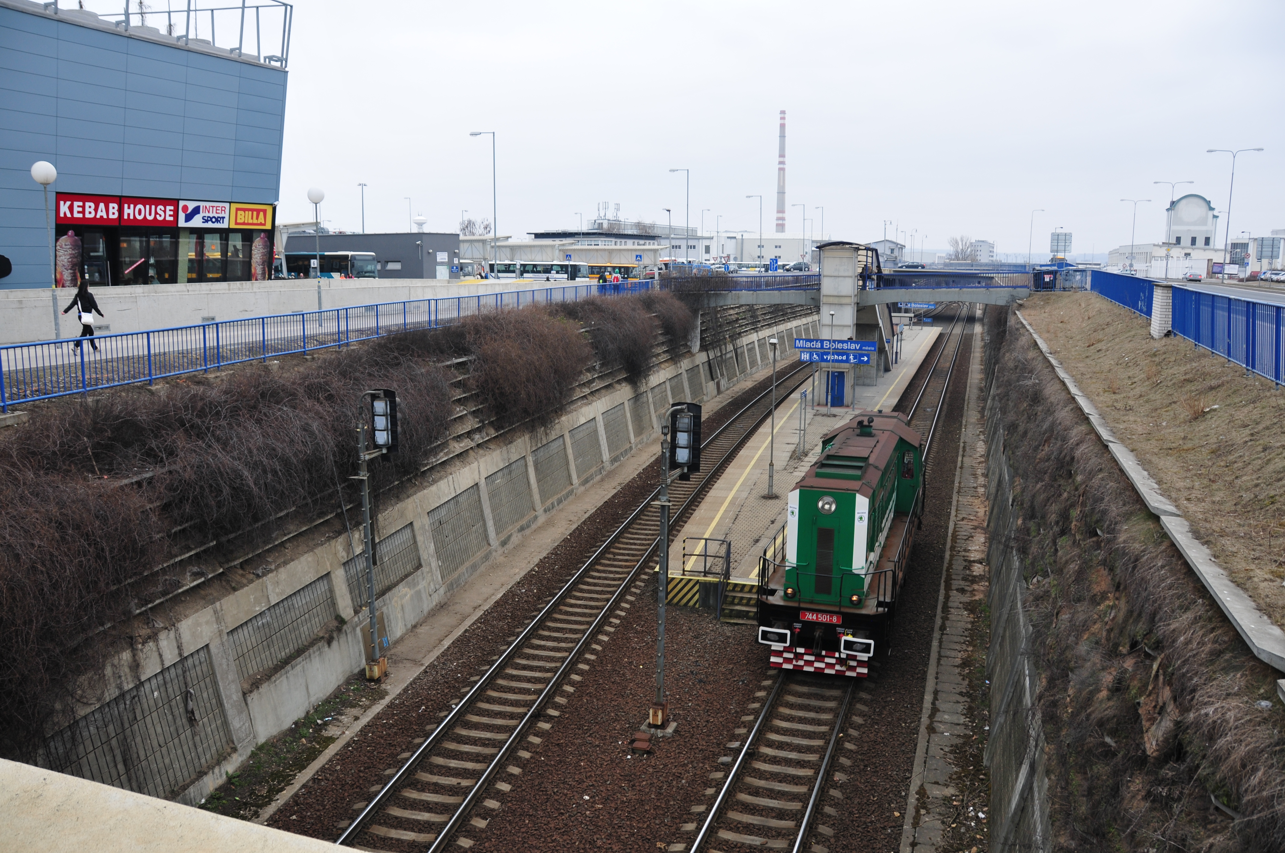 Fototermin Škoda Museum Mladá Boleslav 2013 Fototermin Škoda Muzeum 5. April 2013 in Mladá Boleslav This work is free and may be used by anyone for any purpose. If you wish to use this content, you do not need to request permission as long as you follow any licensing requirements mentioned on this page.